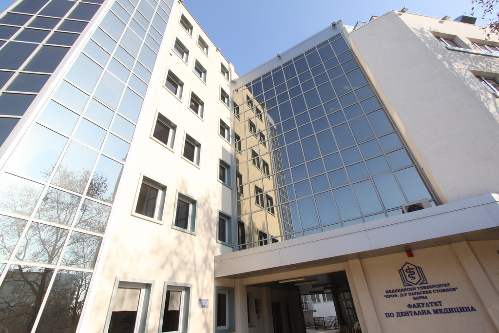 Сграда на Факултета по дентална медицина, МУ-Варна